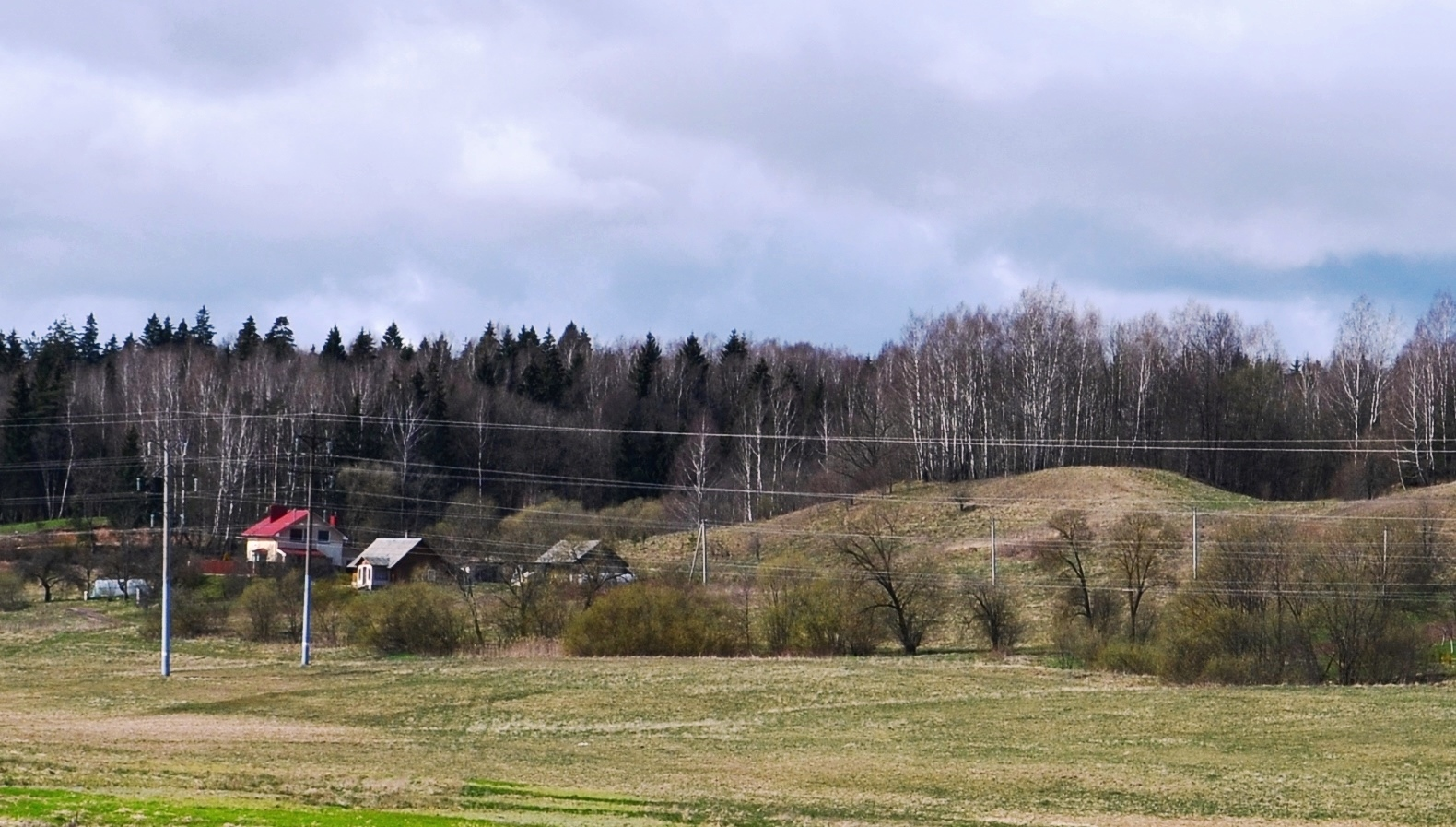 Piliakalnis, Maž. Riešės k., Vilniaus raj.